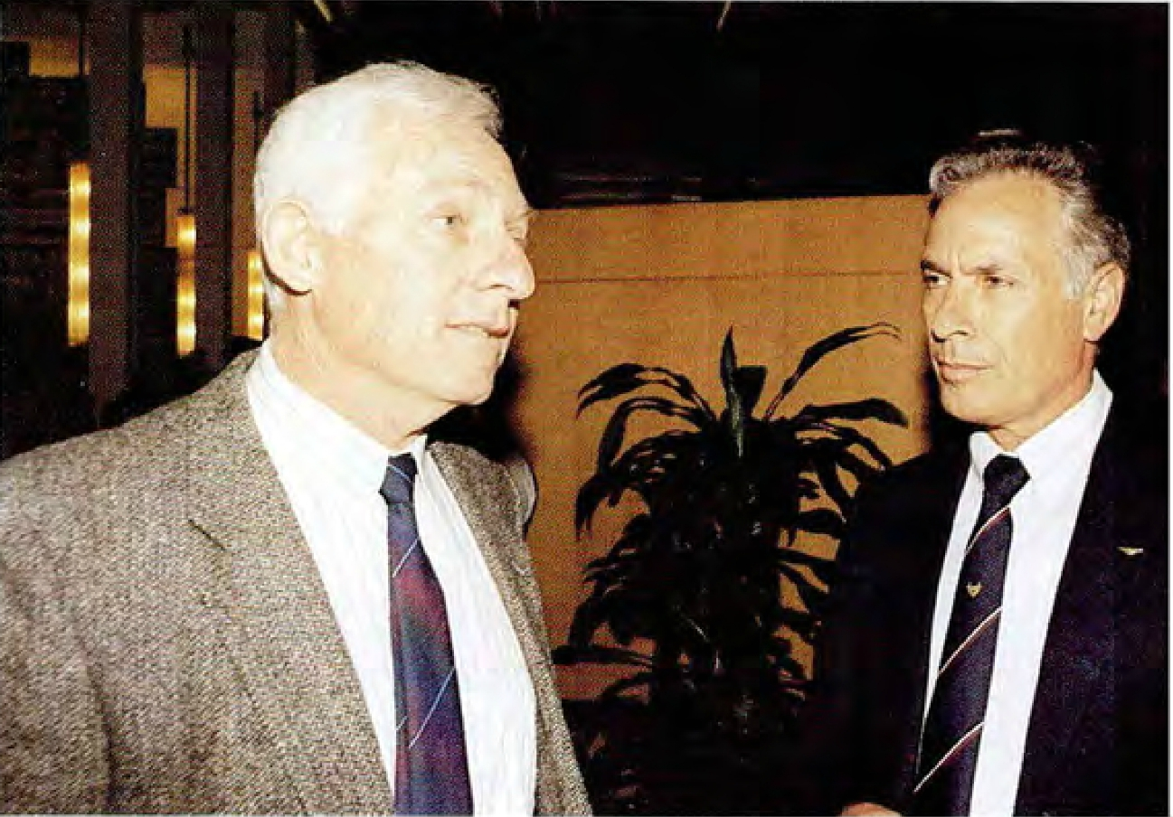 המפגש השנתי של ארבעת בוגרי קורס הטייס הראשון של חיל האוויר בבית עזר ויצמן, 1994. אביהו בן נון (מימין) ועמוס לפידות.